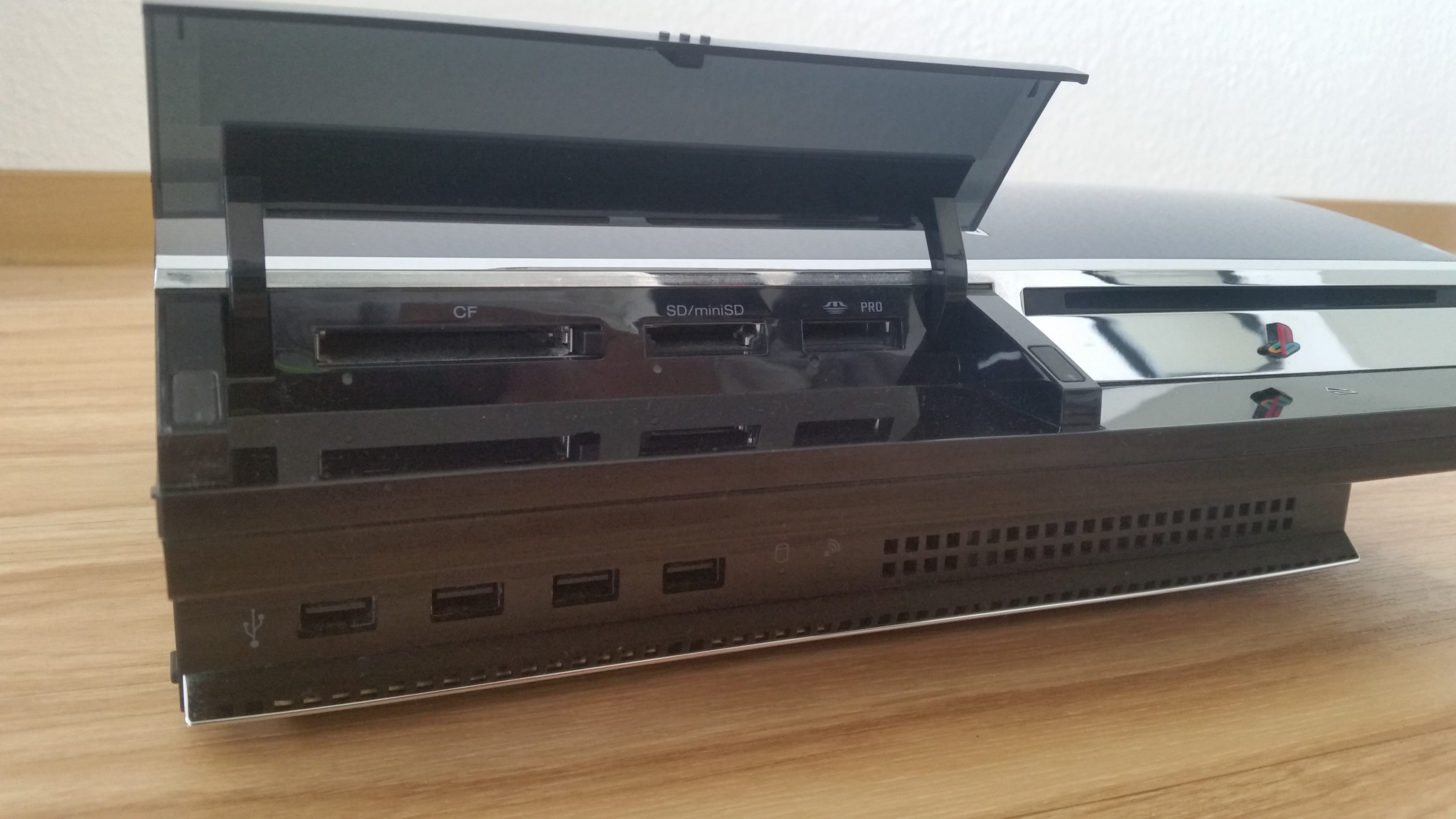 Frontansicht der Modell Nr. CECHCxx mit Kartenleser, 4 USB Anschlüssen, 3 Kartenseser-LEDs, Festplatten-LED und W-LAN-LED